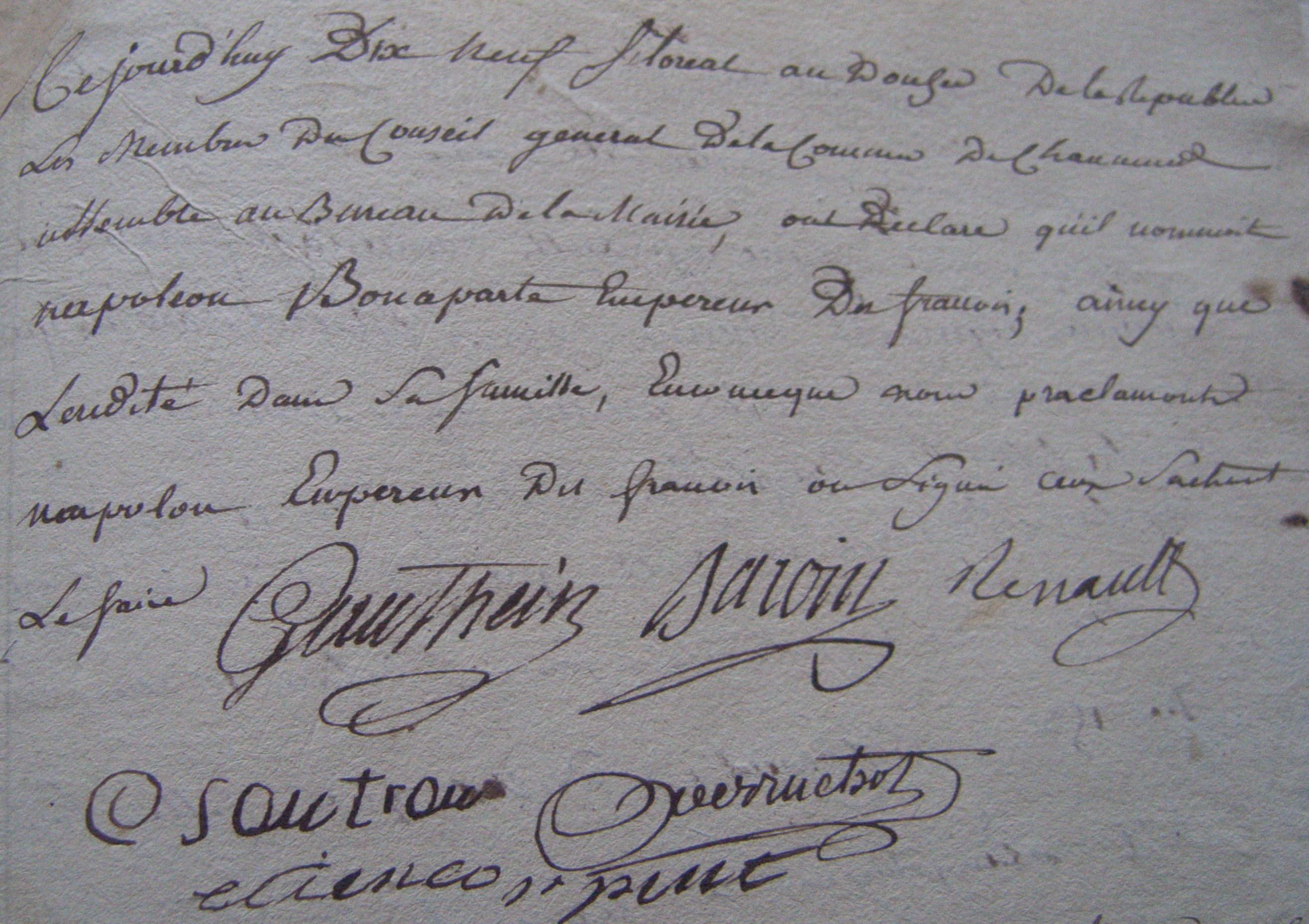 Reconnaissance de Napoléon Bonaparte en tant qu’Empereur par une petite commune de la Nièvre 19 Floréal An 12 (9 Mai 1804).